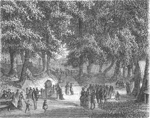 Kirsten Pils Kilde i Jægersborg Dyrehave. Oprindelig en af de mest besøgte Sunhedskilder.